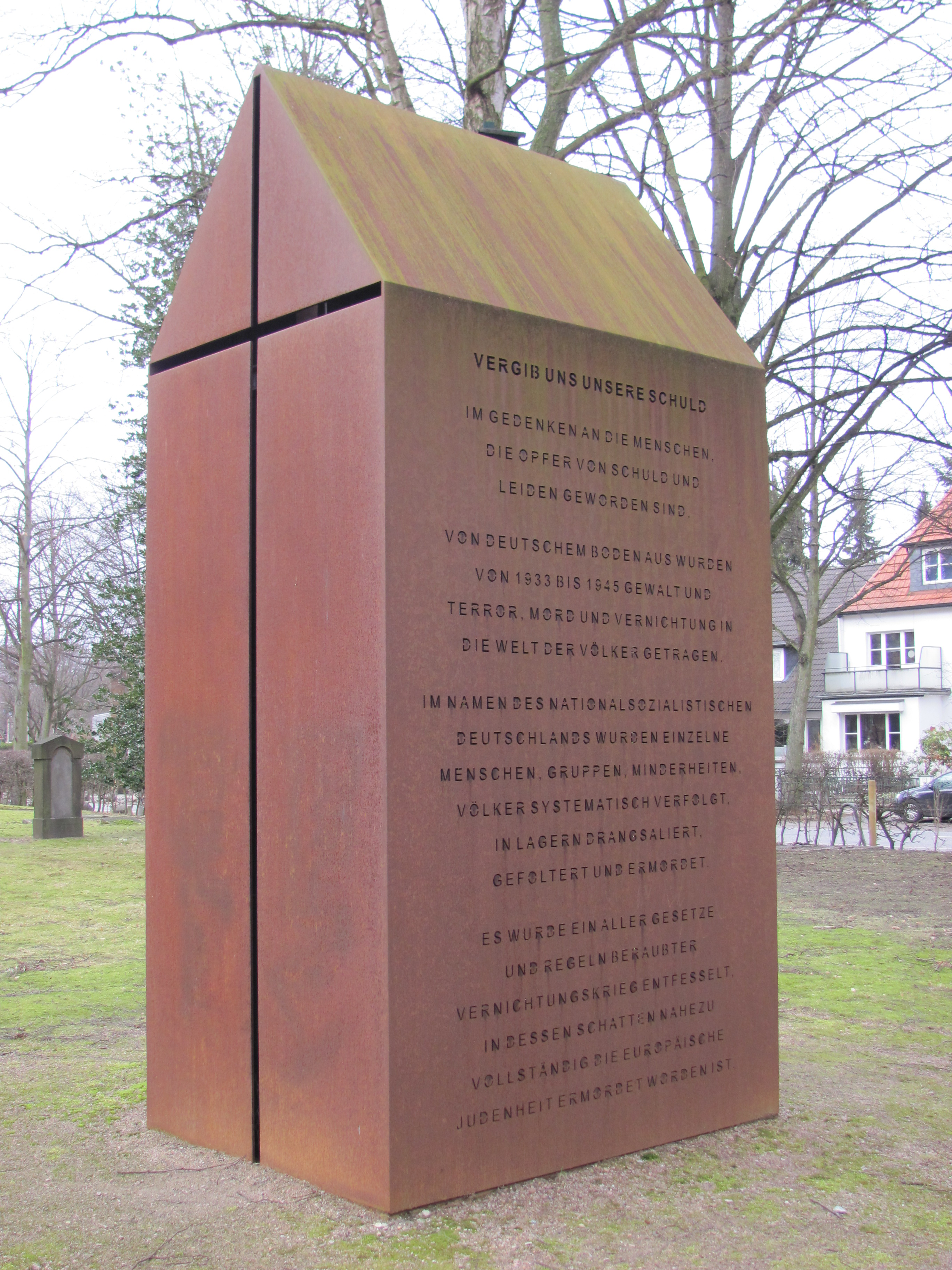 Alter Hammer Friedhof in Hamburg-Hamm: Mahnmal für die Opfer des Nationalsozialismus und die Bombenopfer des Zweiten Weltkriegs (Entwurf: Ulrich Lindow, 2007).